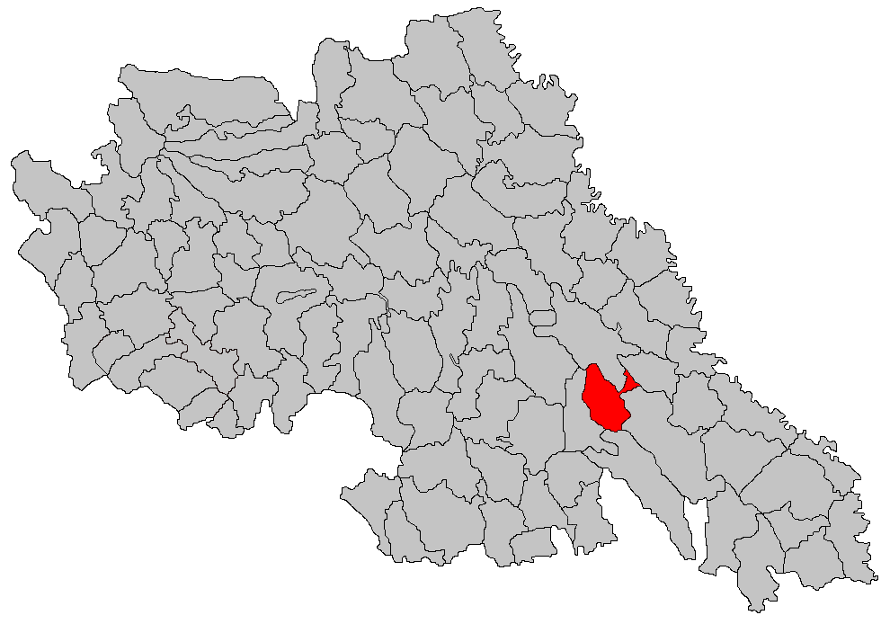 Categorie:Hărţi ale judeţului Iaşi